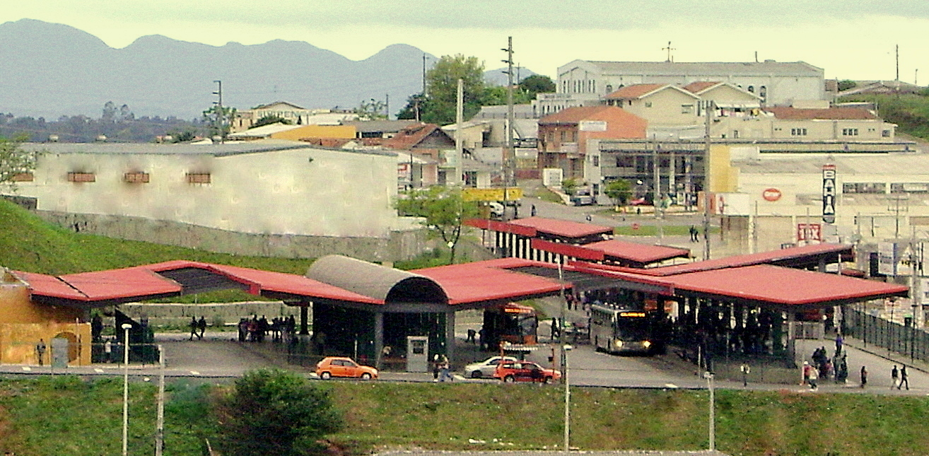 Vista do parcial do Terminal do Maracanã, localizado no município de Colombo, PR, sul do Brasil.